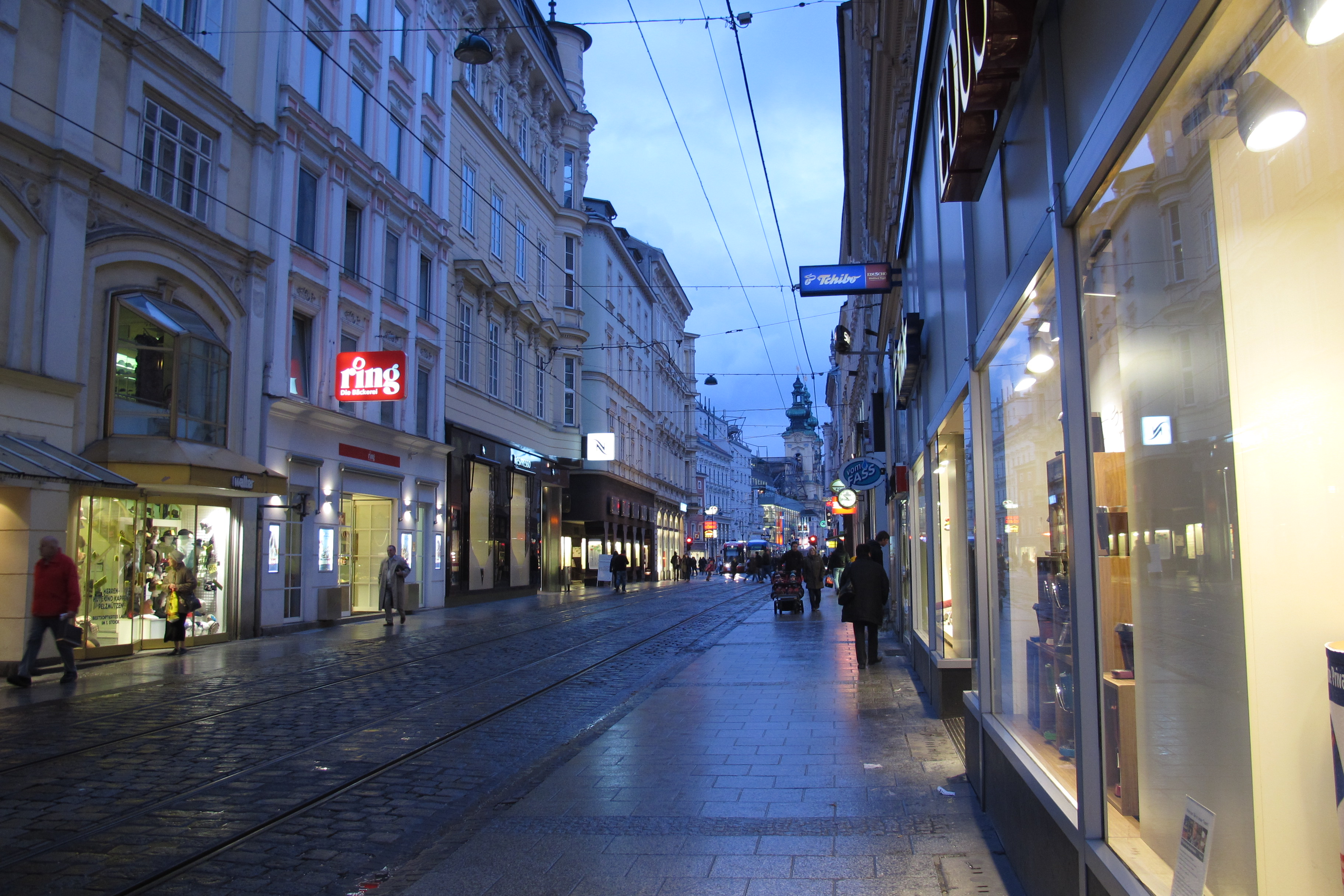 Die Schmiedtorstraße in der Linzer Innenstadt mit Blickrichtung Taubenmarkt/Landstraße